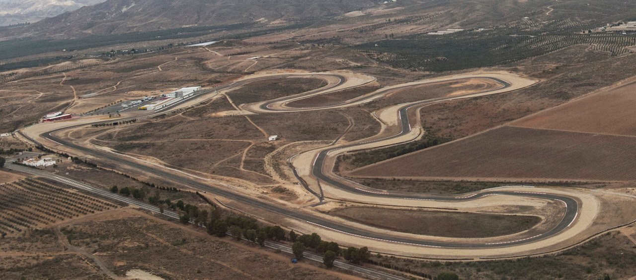 Vista aérea